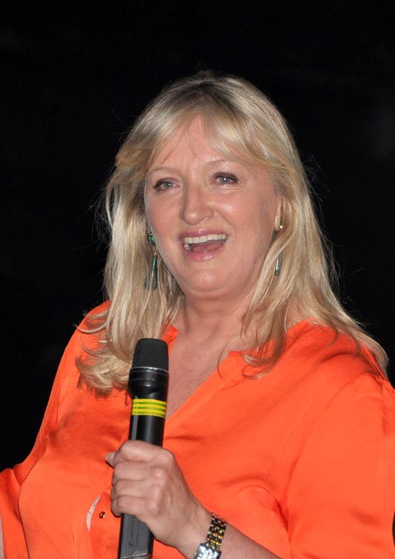 Charlotte de Turckheim à l'avant-première du film Mince alors !